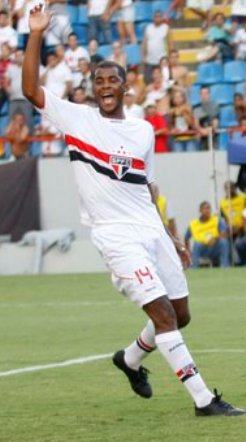 Renato Silva em ação no São Paulo Futebol Clube em 2010